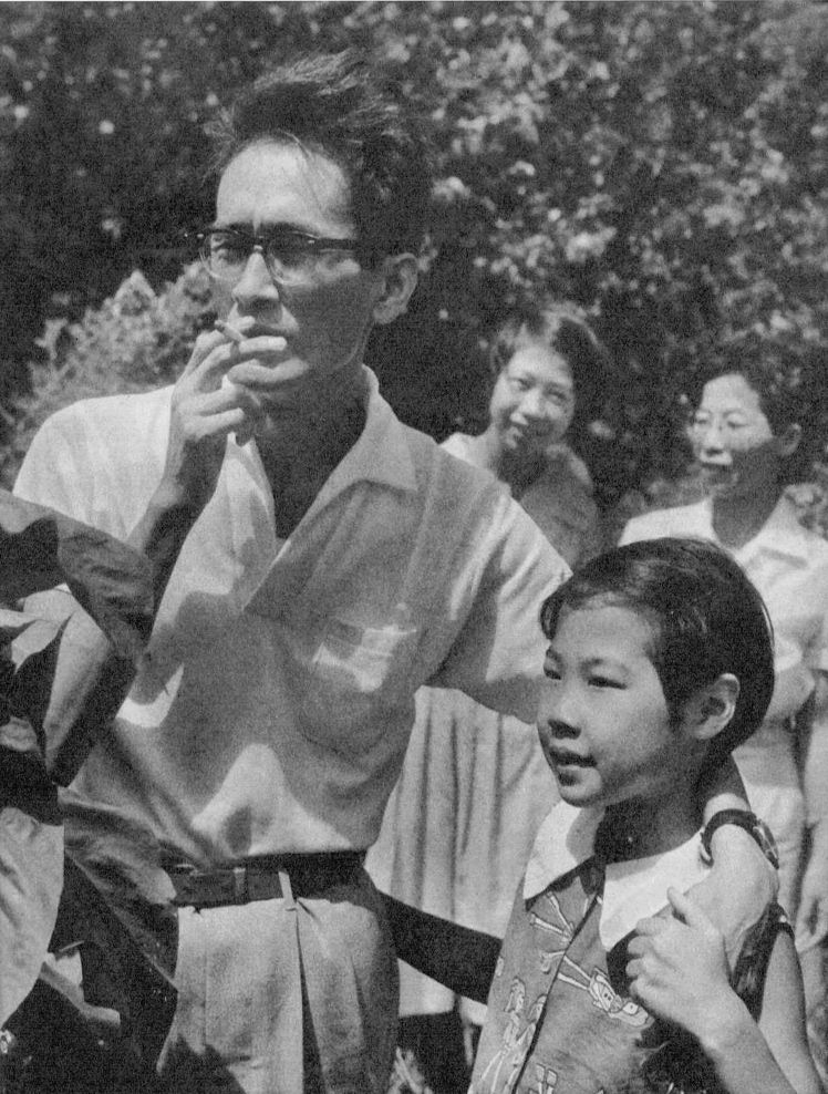 婦人生活社『婦人生活』第13巻第10号（1959）より斯波四郎